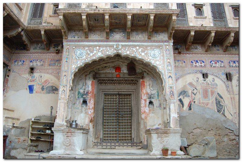 Haveli, Mandawa, India